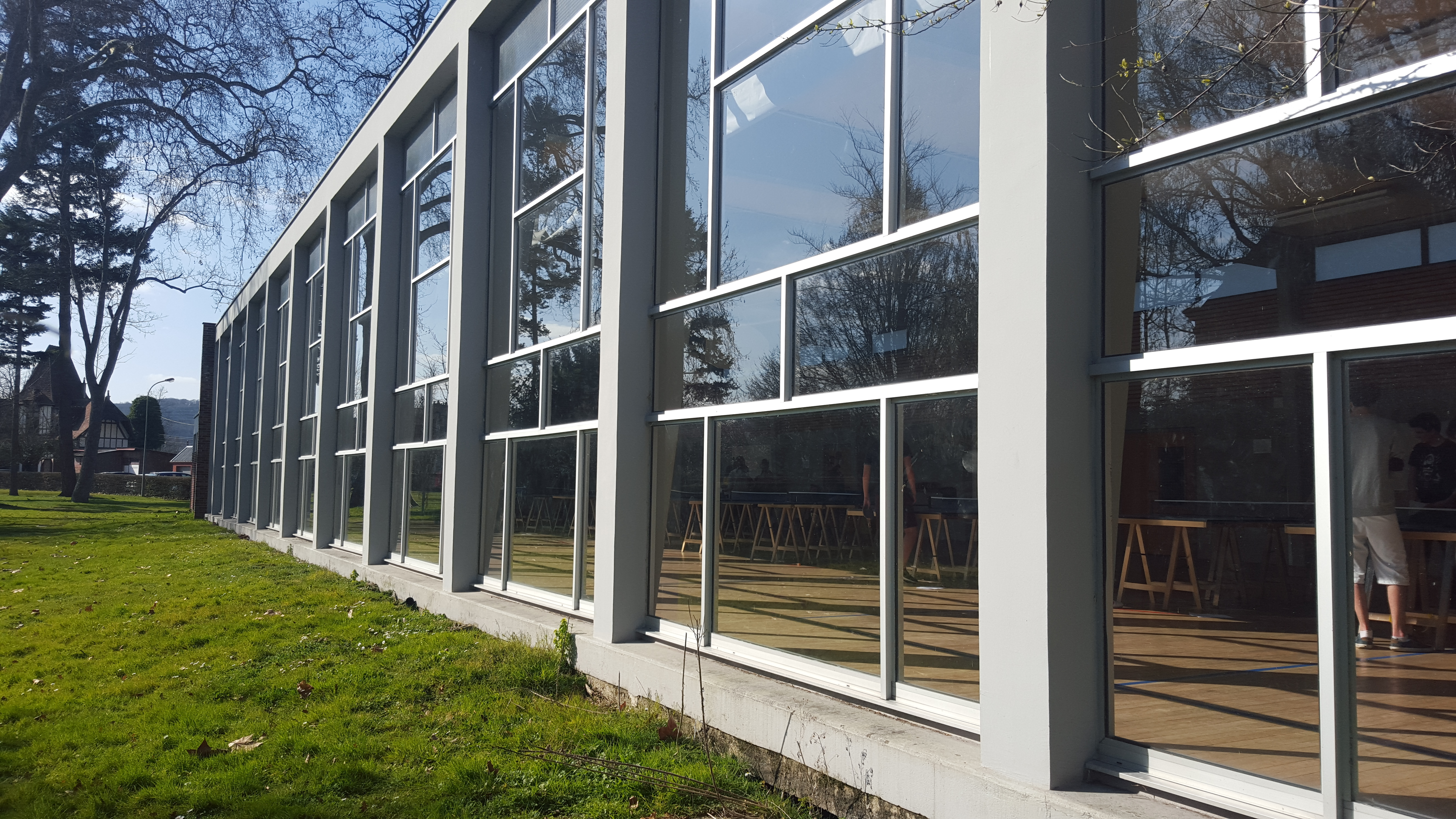 Le gymnase du lycée accueille aussi des compétitions dans le cadre de l'UNSS comme des matchs de tennis de table.